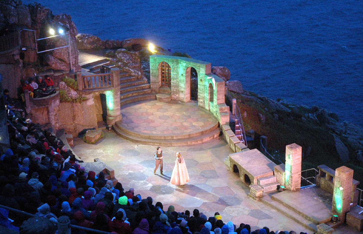 Shakespeare-Aufführung in den Klippen von Porthcurno. Minack-Theatre 2012